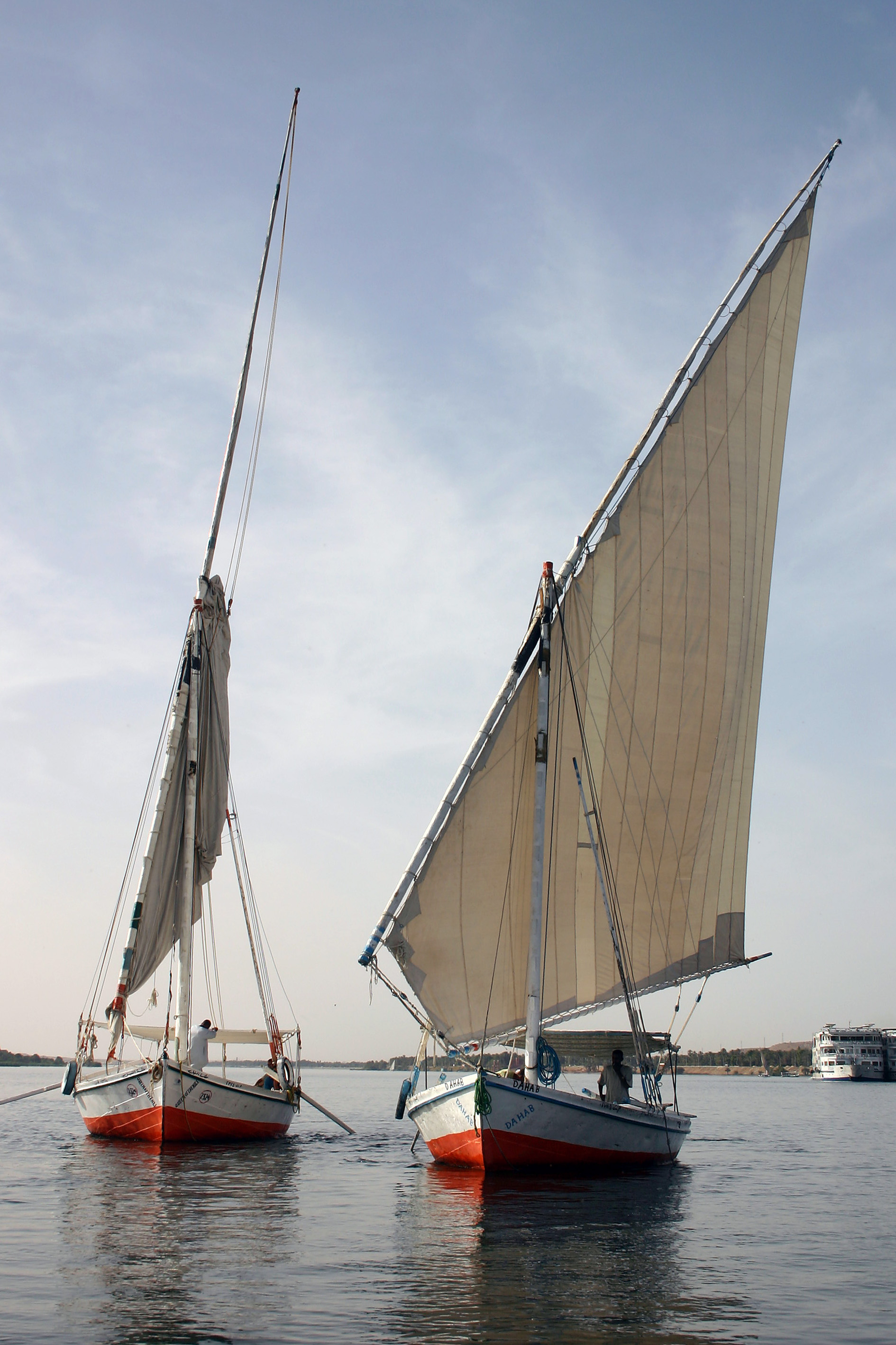 Félouques à Assouan